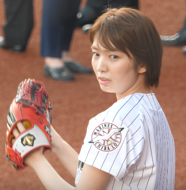 朝香りほです。